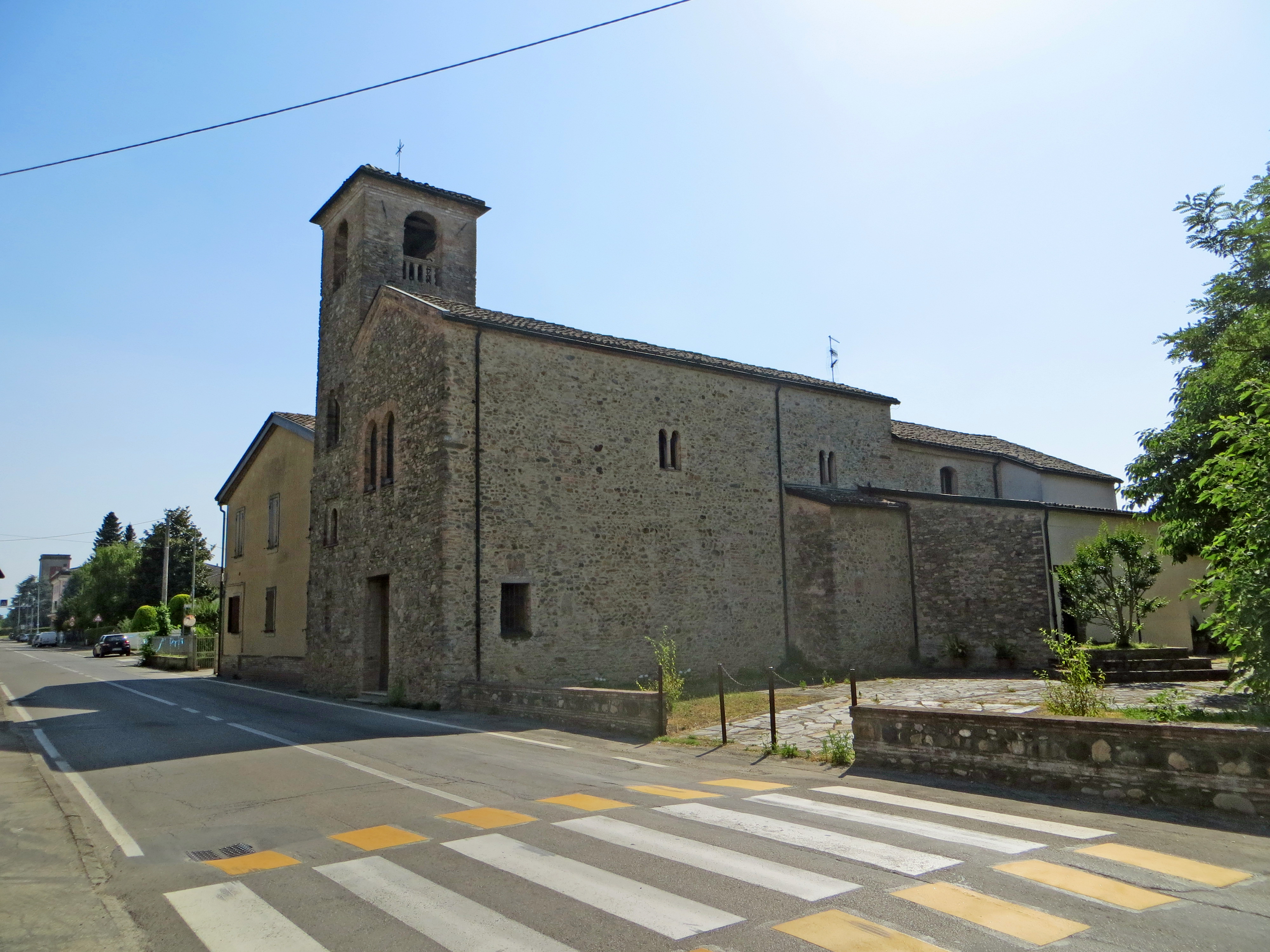 Chiesa di San Lorenzo (Alberi, Parma) - facciata e lato nord